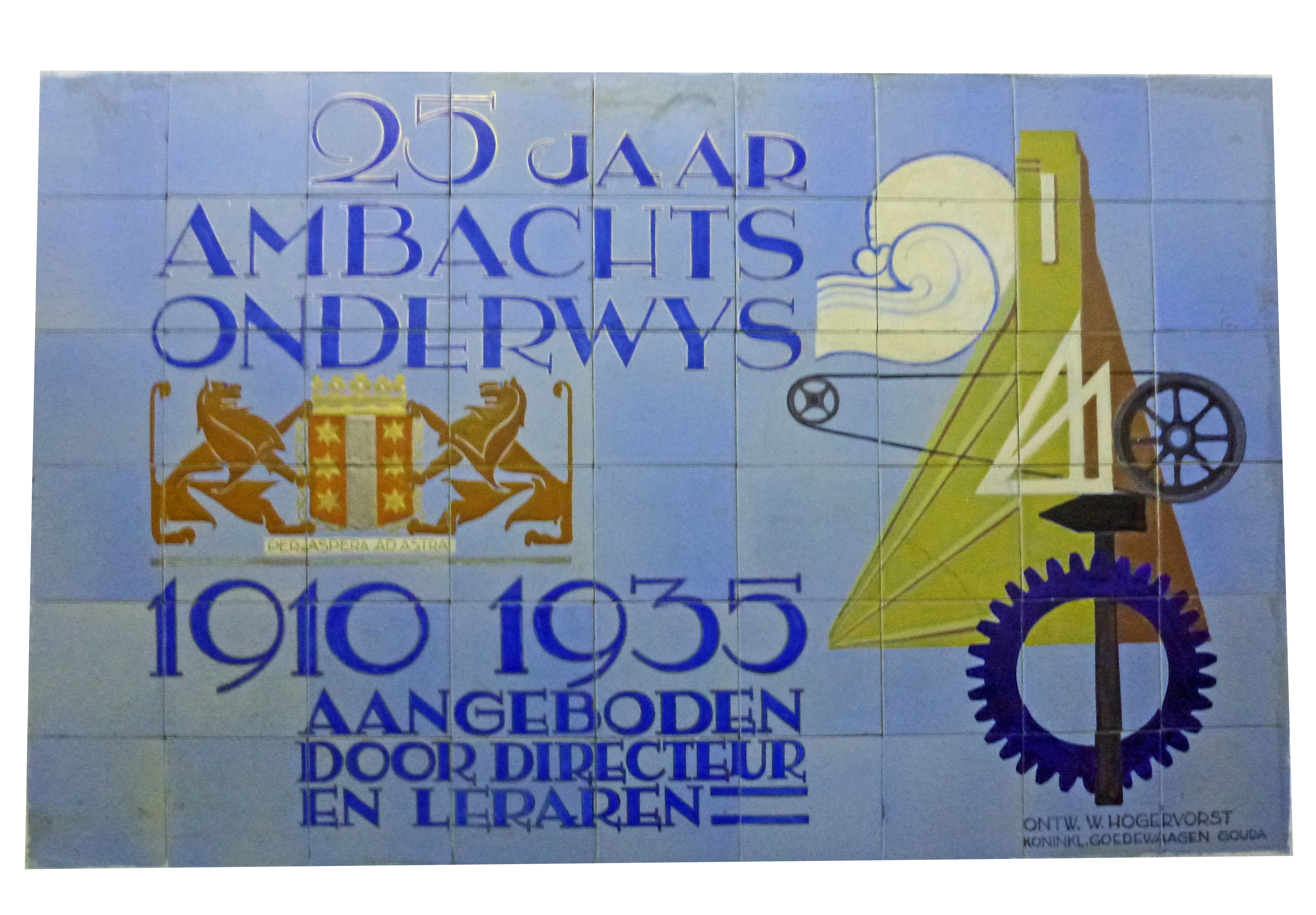 Tegeltableau met de hoofdkleur blauw. De Tekst is: 25 jaar ambachtsonderwijs 1910-1935. Aangeboden door directeur en leraren. Twee leeuwen tussen wapenschild met de tekst: Per Aspera Ad Astra (door de doornen naar de sterren) Verder een blazende wolk en enige werktuigen. Het tegeltableau is ontworpen door W. Hogervorst, Plateelbakkerij Koninklijke Goedewaagen, Gouda. Het tableau is gemetseld aan de wand in het voorportaal van de Ambachtsschool Gouda